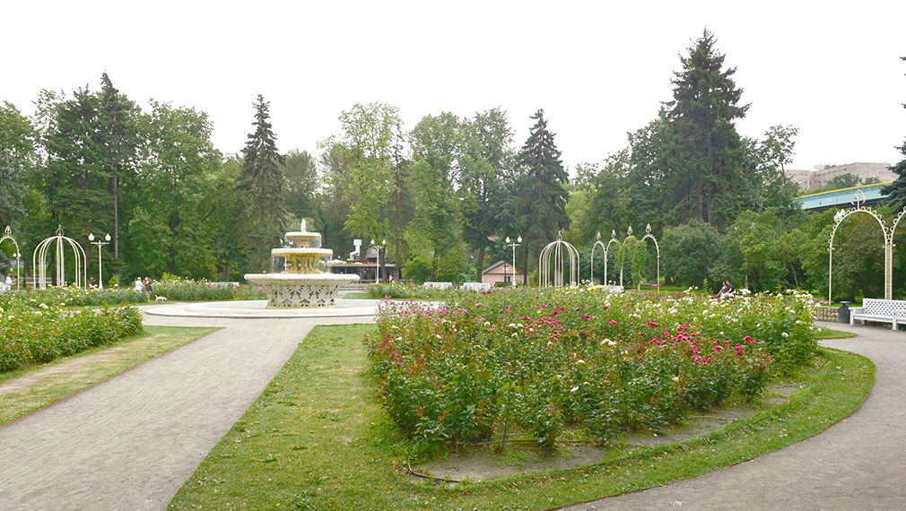 Розарий в Парке Горького